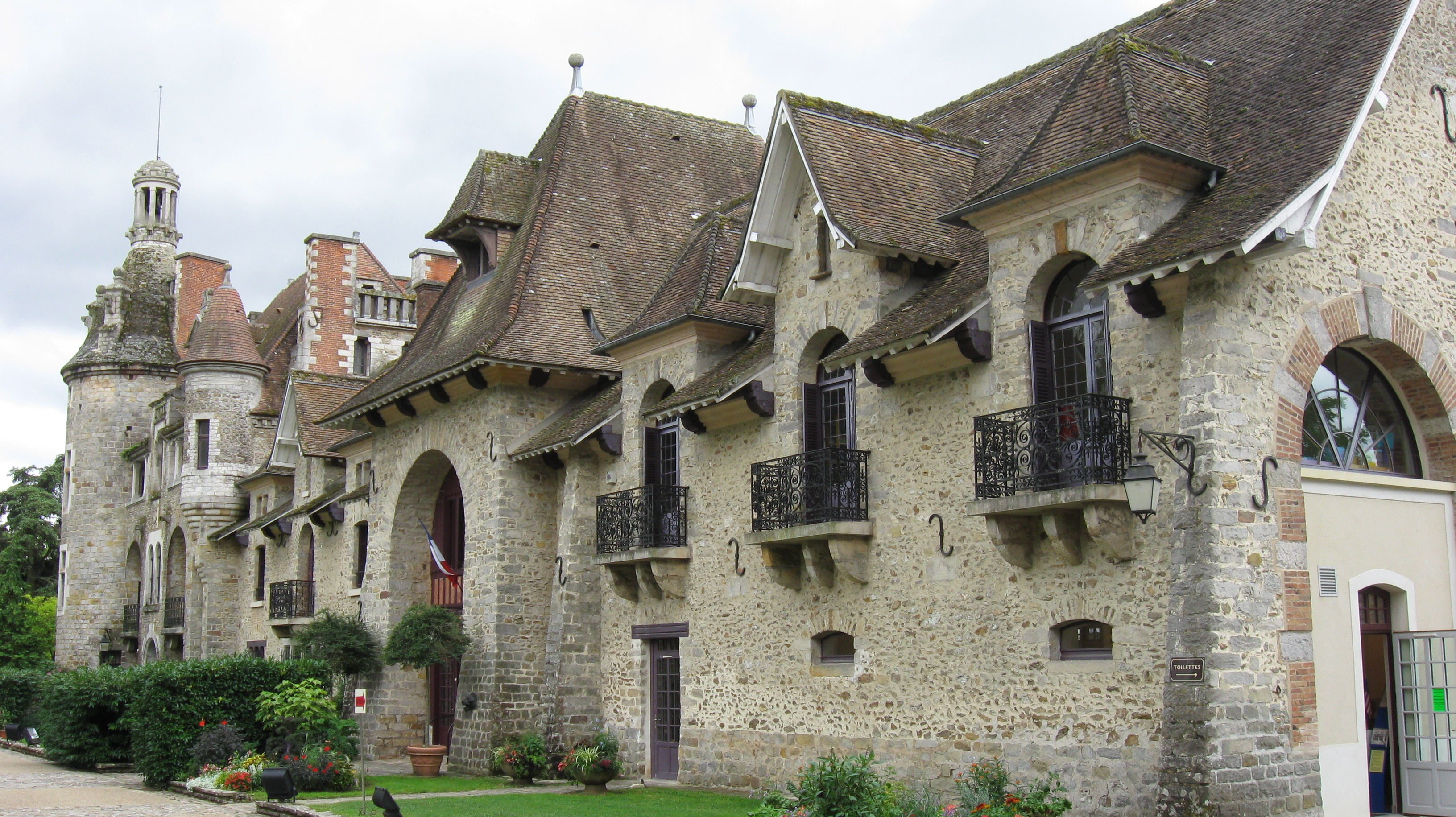 Le château des Dames au Châtelet-en-Brie. (Seine-et-Marne, région Île-de-France).